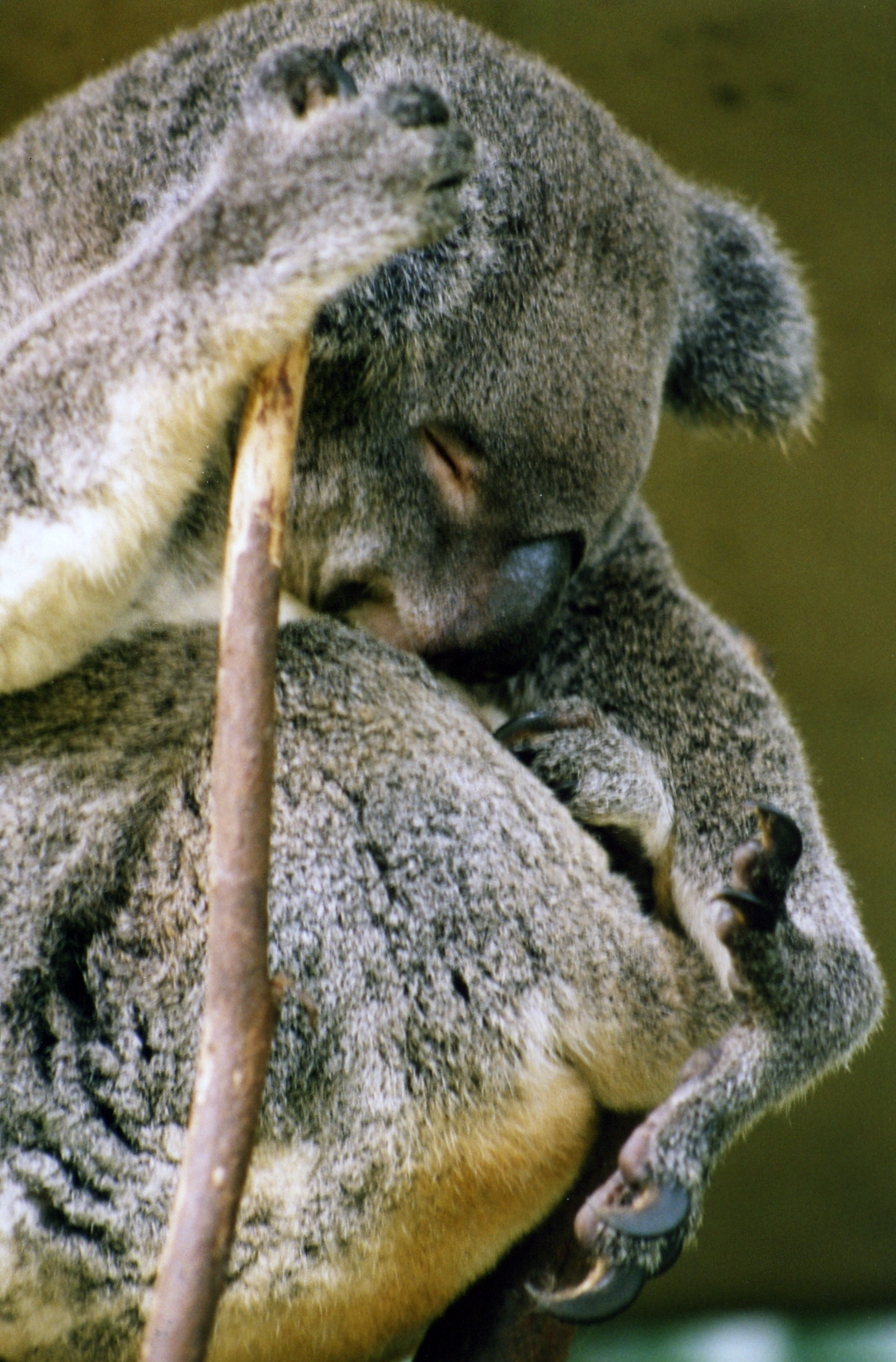 Koala asleep